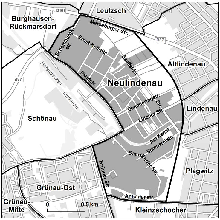 Der Leipziger Ortsteil Neulindenau und seine Nachbarn